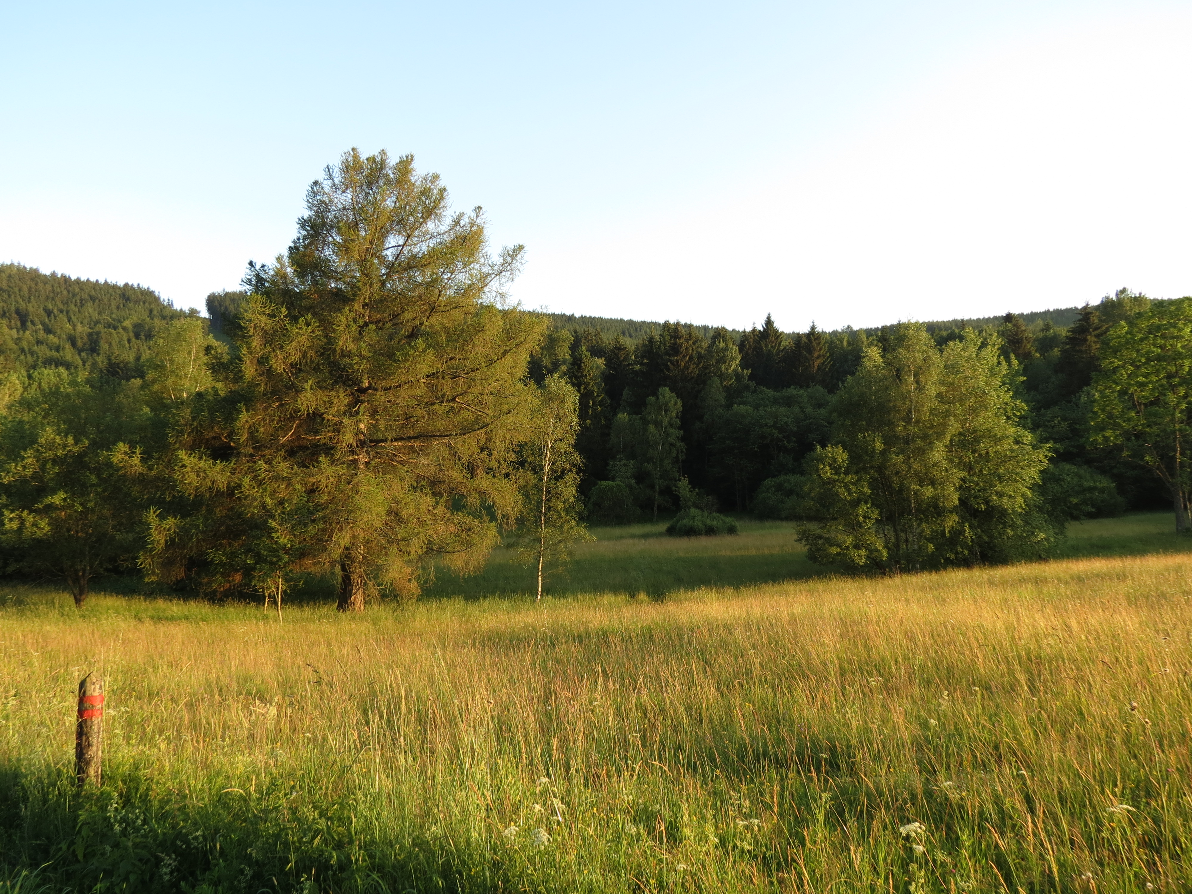 PR Přemyslovské sedlo2